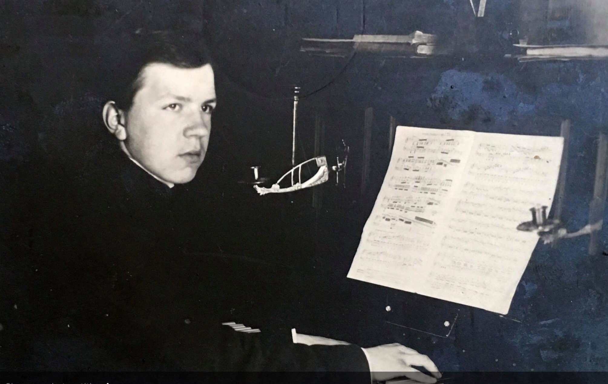 Komponista Valdemāra Ozoliņa jaunības dienu portrets pie klavierēm. Foto no personīgā arhīva.